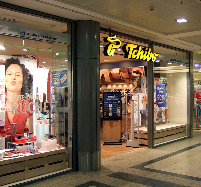 Tchibo Geschäft in Darmstadt